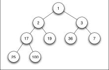 Min heap polovicni velikost